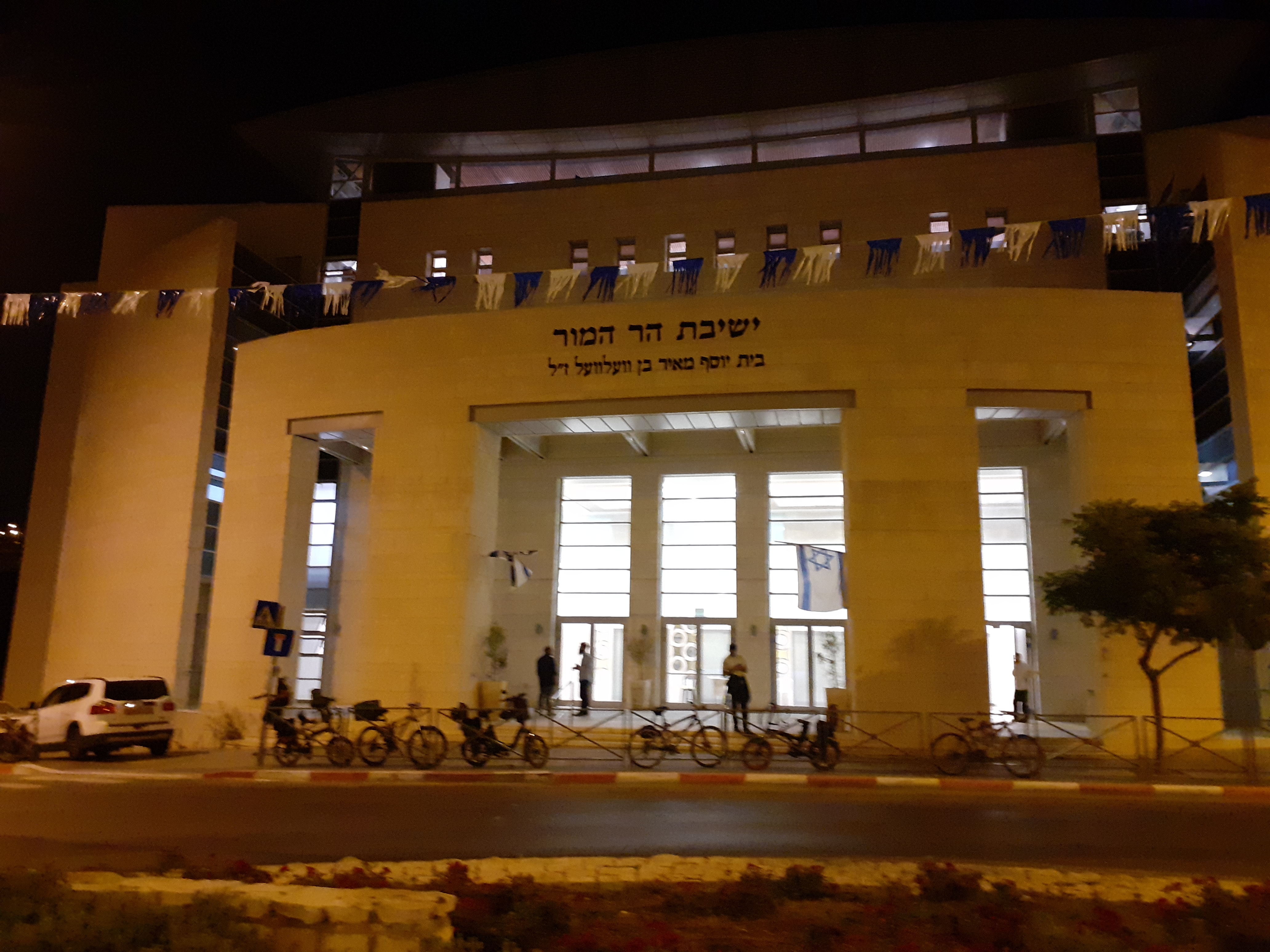 הר המור בהר חומה